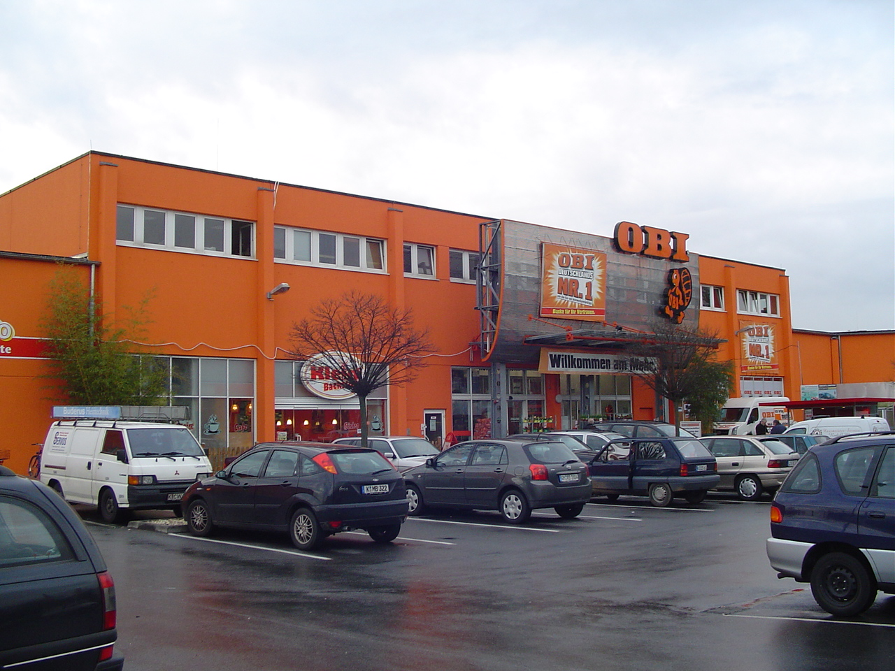 OBI Baumarkt, Köln-Buchheim